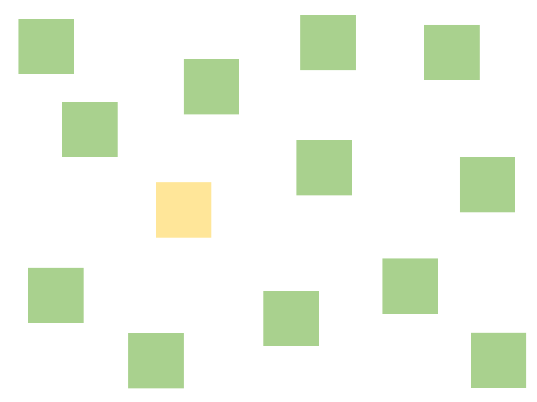 Feature Search